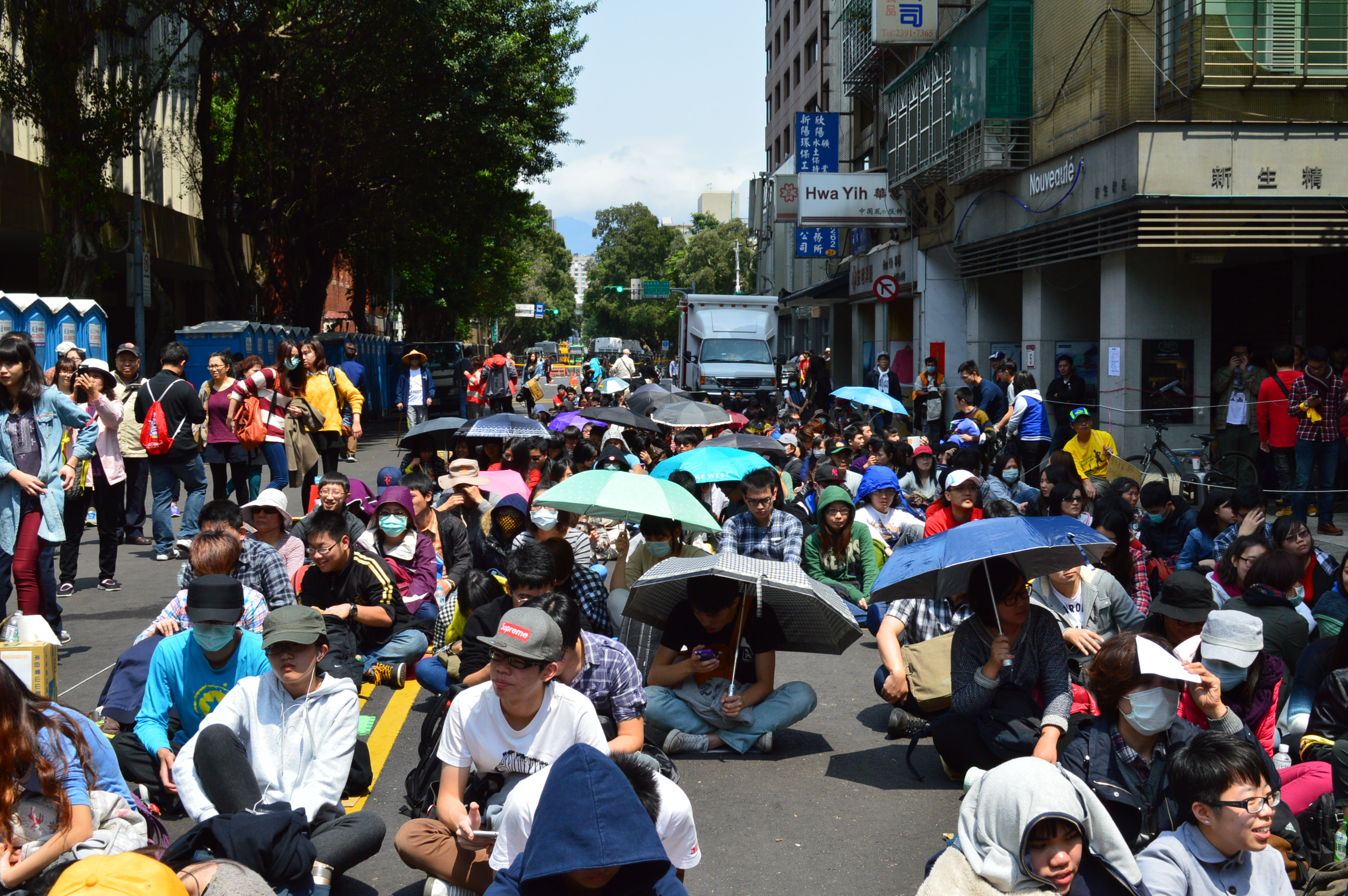 陽光下的抗議學生。